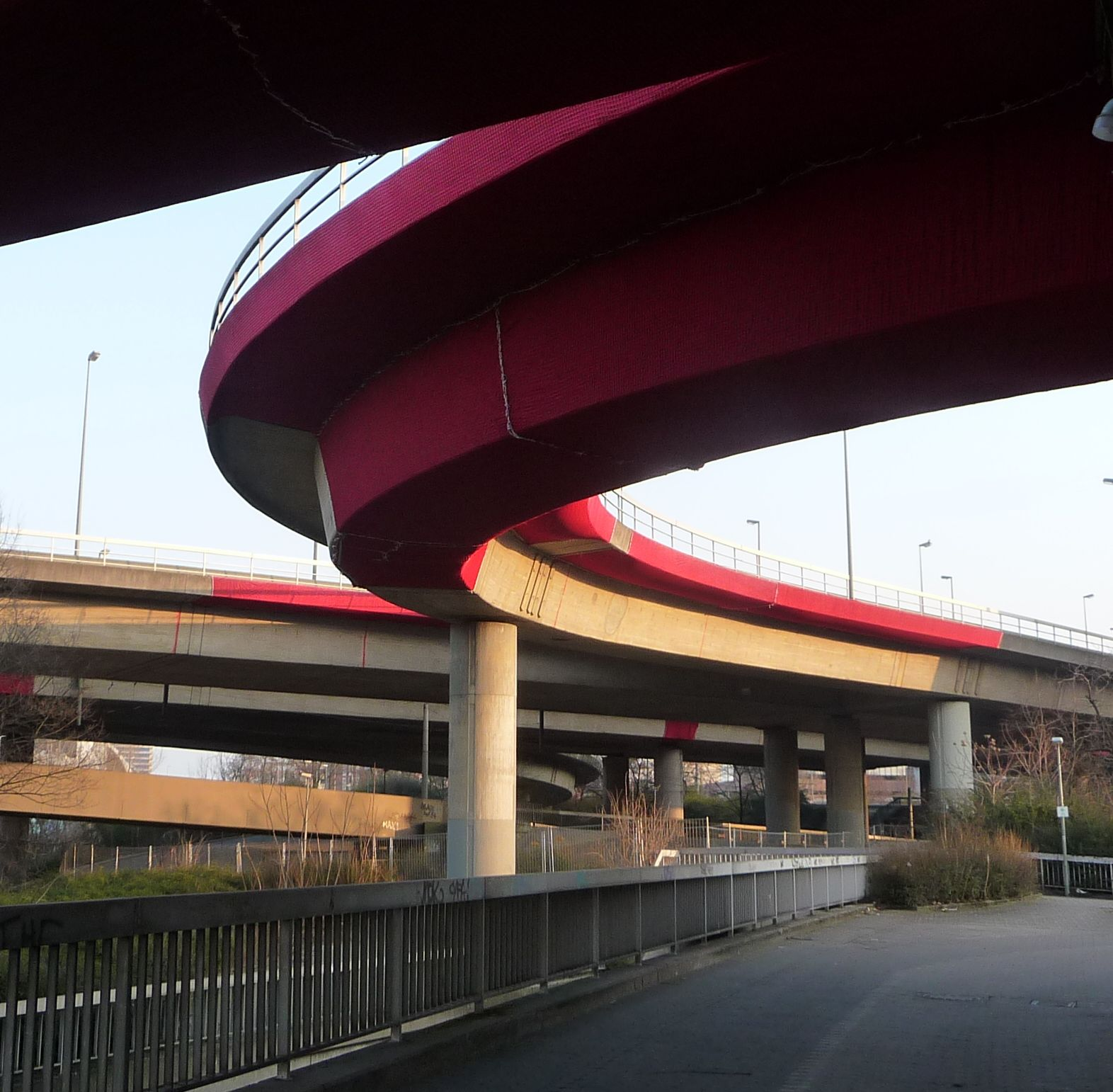 Neckisches rotes Kleid für marode Brücken